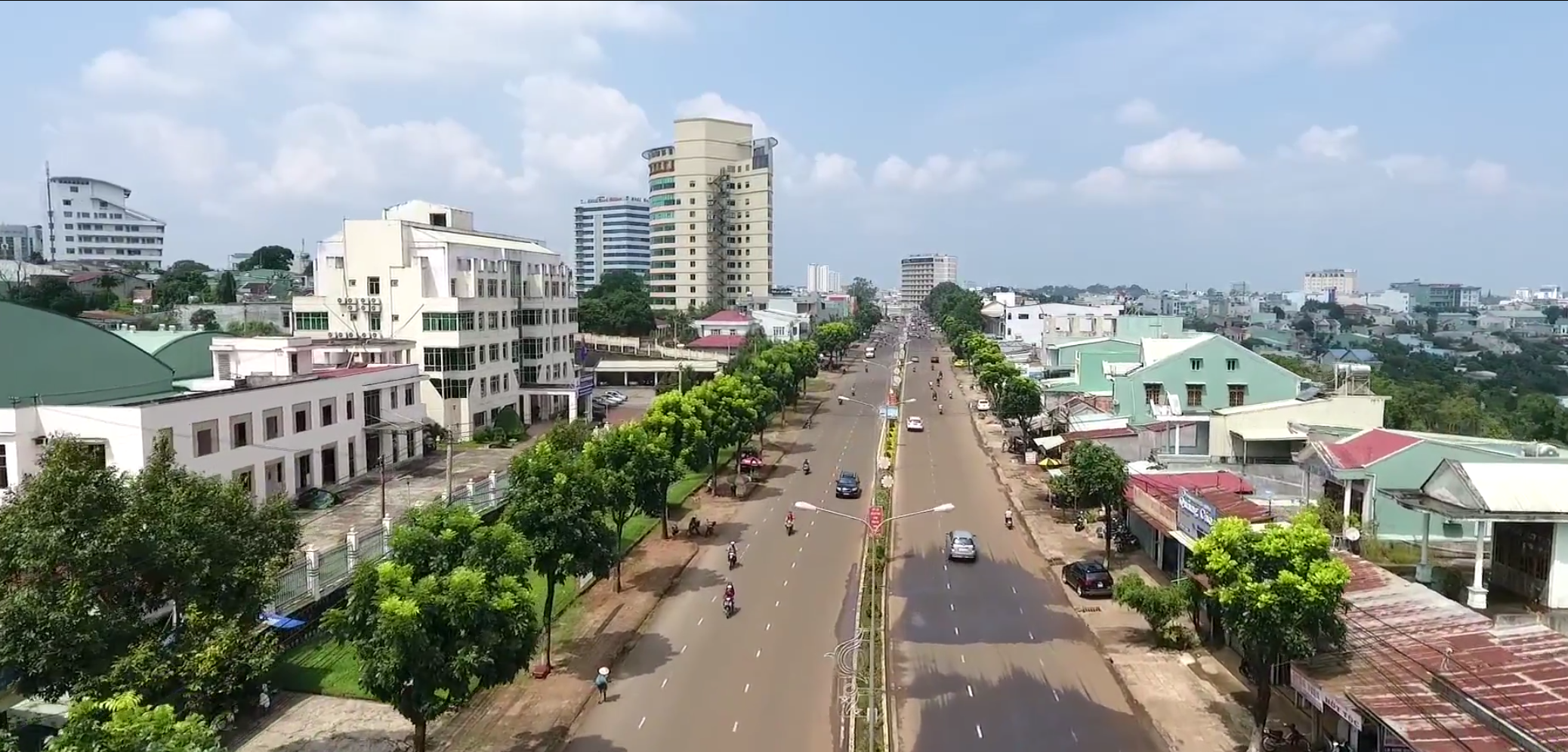 đường Lê Duẩn - Tp.Pleiku được chụp từ flycam